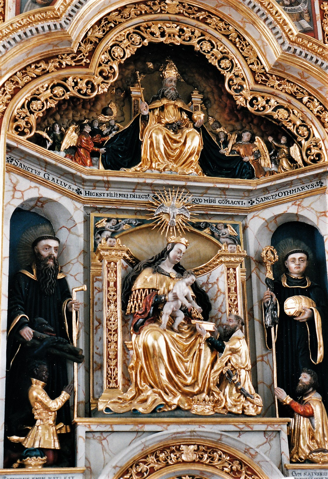 Hochaltar St. Sebastian (Rummeltshausen)